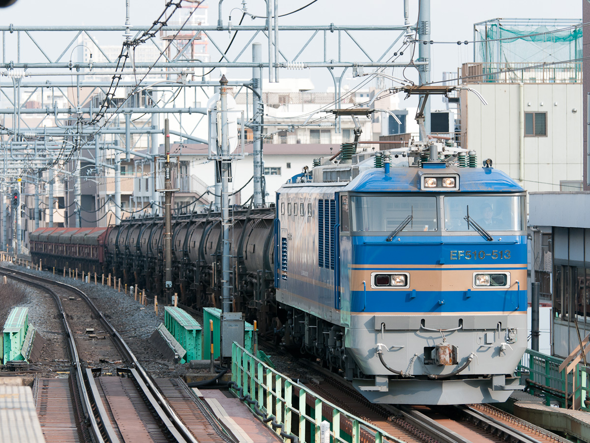 JR東日本EF510-513、小名浜港→安中間の専用貨物列車、常磐線三河島駅。